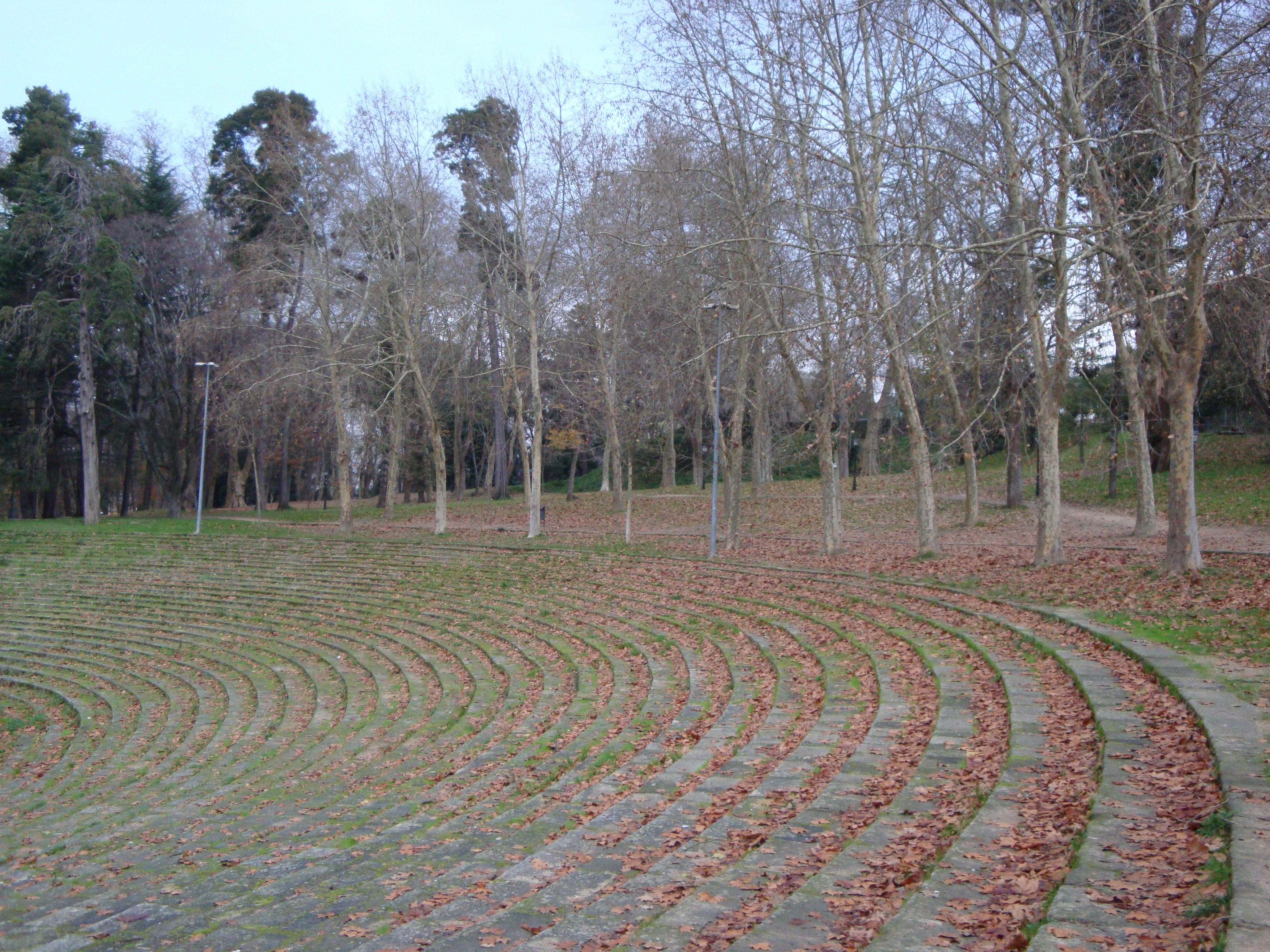 Vigo, Castrelos, anfiteatro